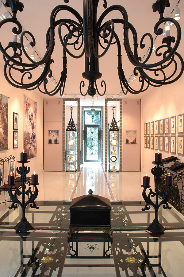 Capella Gero Trauth